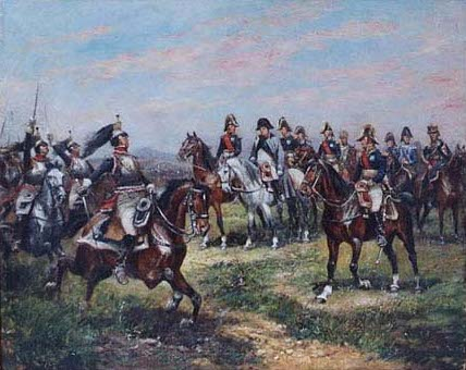 "LE MARÉCHAL MASSENA PRÉSENTE LE 1° RÉGIMENT DE CUIRASSIER AVANT LA CHARGE". Marshal Masséna presenting the 1st Cuirassier before the charge at the battle of Essling, May 21-22 1809.